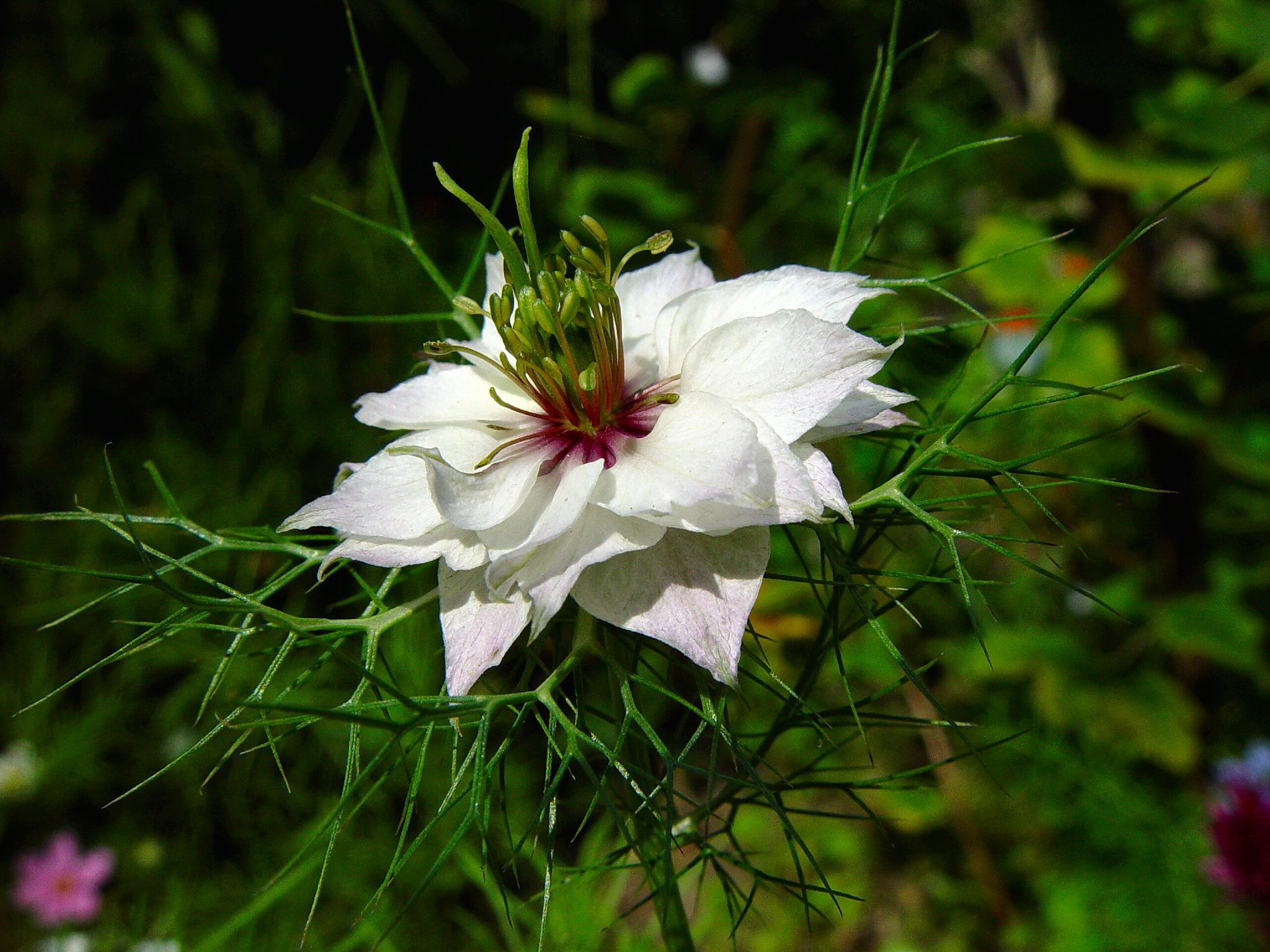 Nigella damascenaNigella damascena